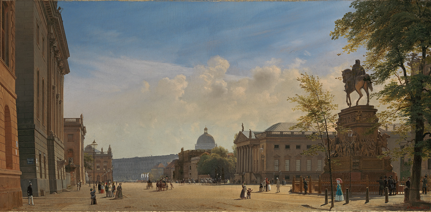 Eduard Gaertner: Berlin, Unter den Linden (mit Reiterdenkmal, Oper und Stadtschloss), 1853, detail